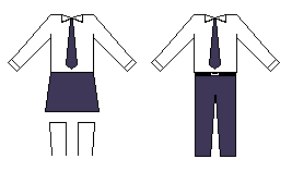 Uniforme del Colegio Nacional Asunción Escalada en Asunción, Paraguay.